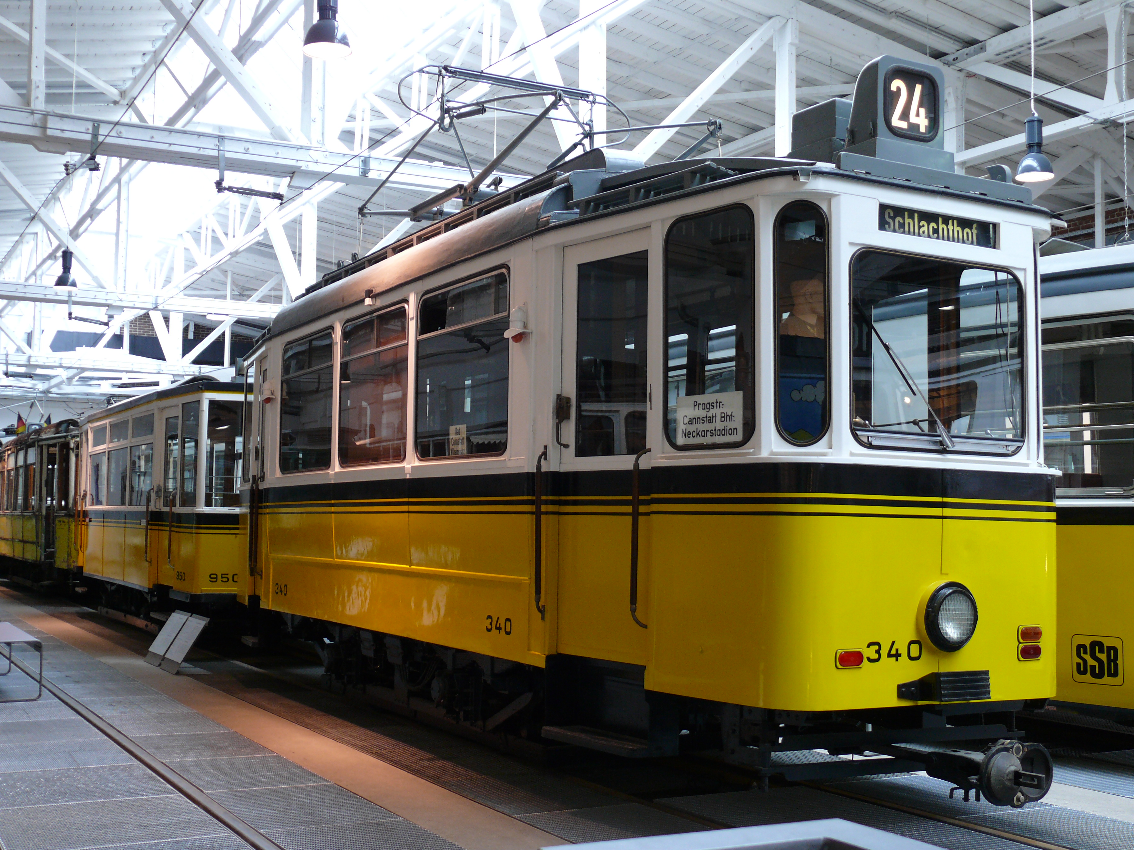 Historische Triebwagen 340 + Beiwagen 950 der SSB im Stuttgarter Straßenbahnmuseum.